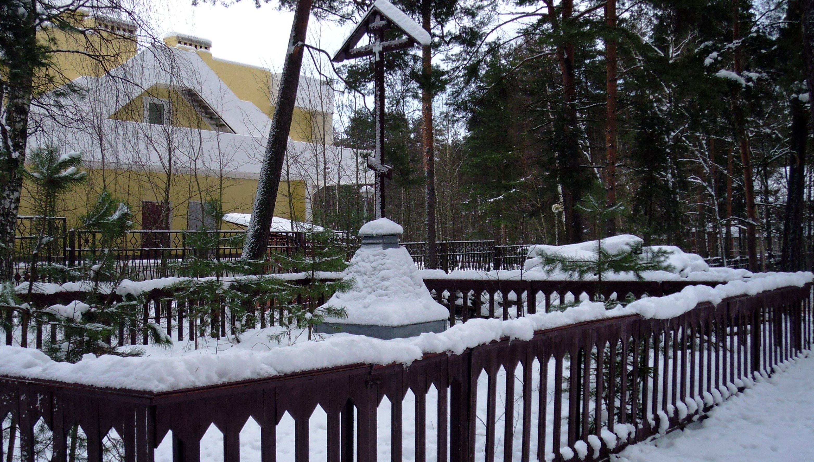 Сестрорецк Тарховская церковь Блокадное захоронение на территории церкви